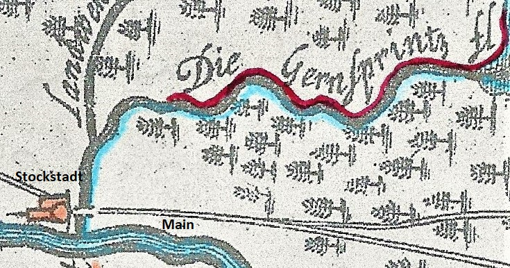 Darstellung eines Flusslaufes mit dem Namen Gern Sprintz (Gernspring) bei Stockstadt am Main, Ausschnitt einer Karte von 1695 (Cent Bachgaw), heutiger Name Gersprenz